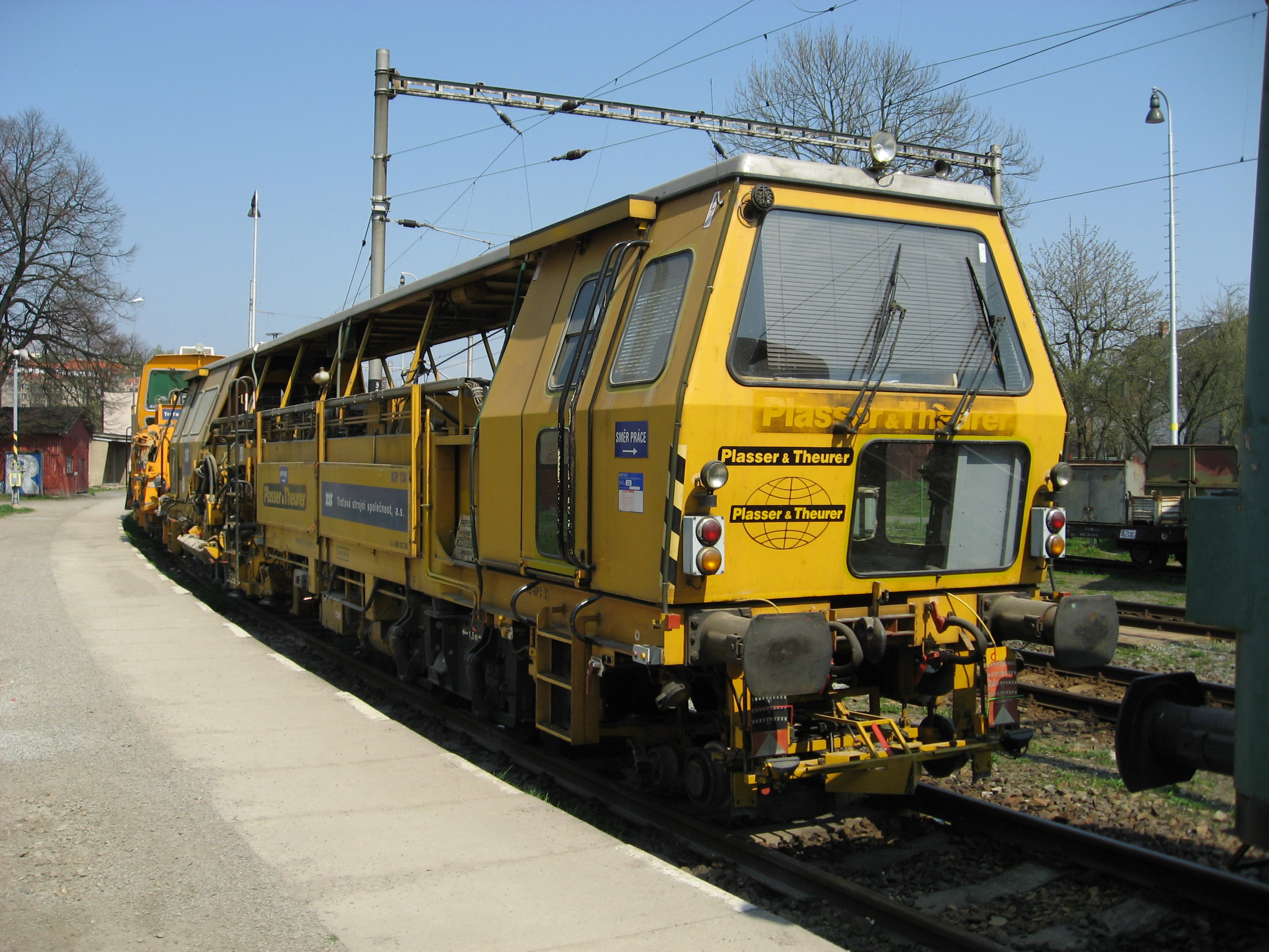 Plasser&Theurer v Havlíčkově Brodě